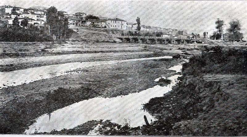 Царево село в началото на 20 век.